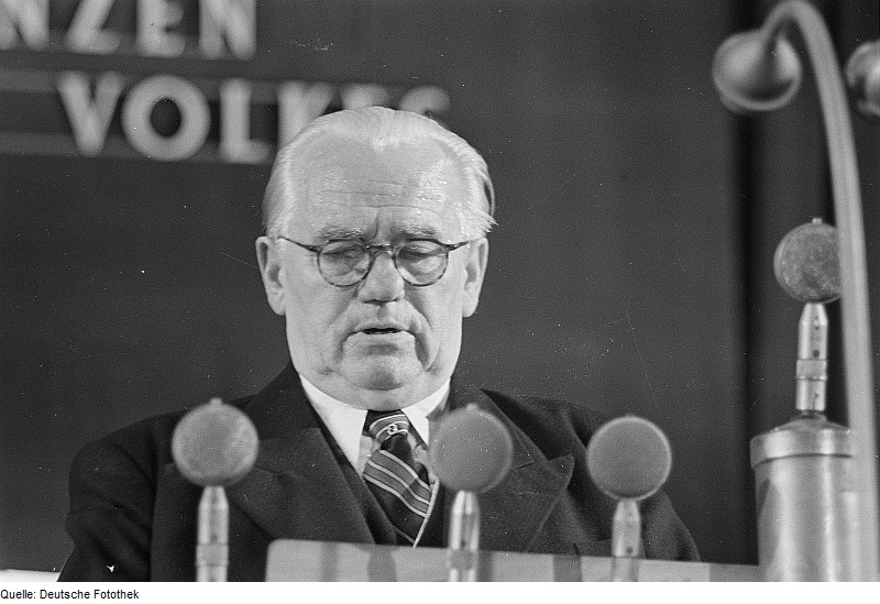 Original image description from the Deutsche Fotothek Portrait Wilhelm Piecks am Rednerpult bei der Bachfeier